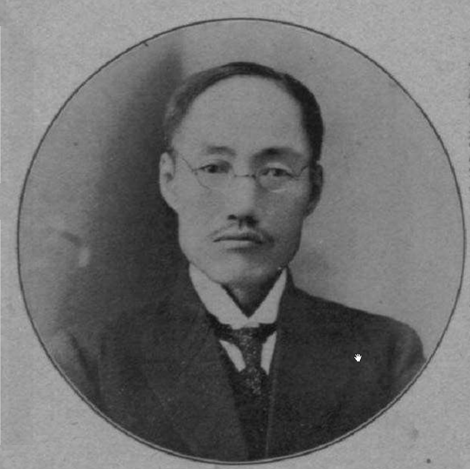 원응상, 한국의 정치인, 경제학자